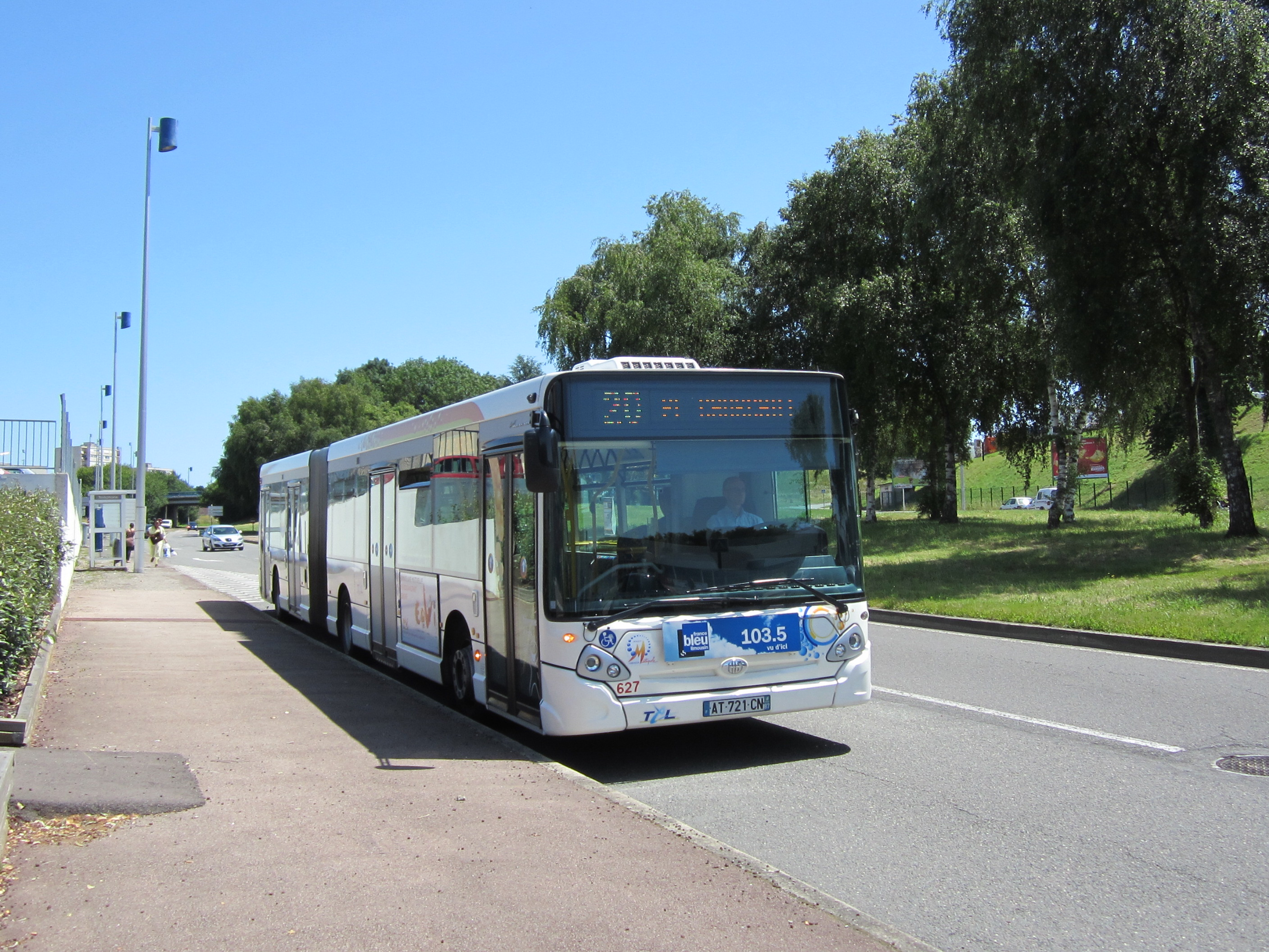 Heuliez GX 427 n°627 de la ligne 20 TCL (Limoges), à l'approche de son arrêt Beaubreuil Centre Commercial.